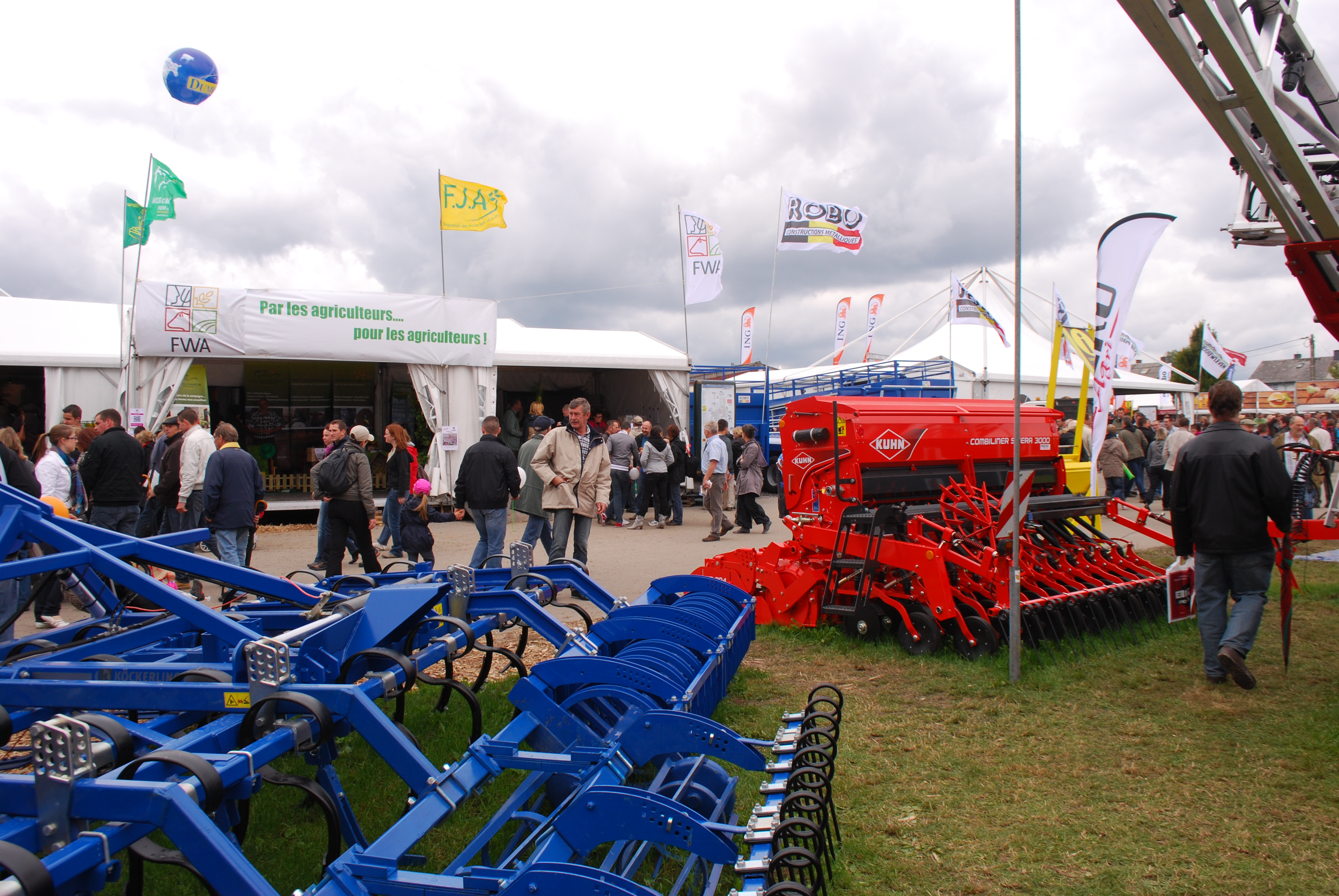 Vue de la foire agricole de Libramont, dimanche 24 juillet 2011 ; présentation FWA, machines de Köckerling et Kuhn.